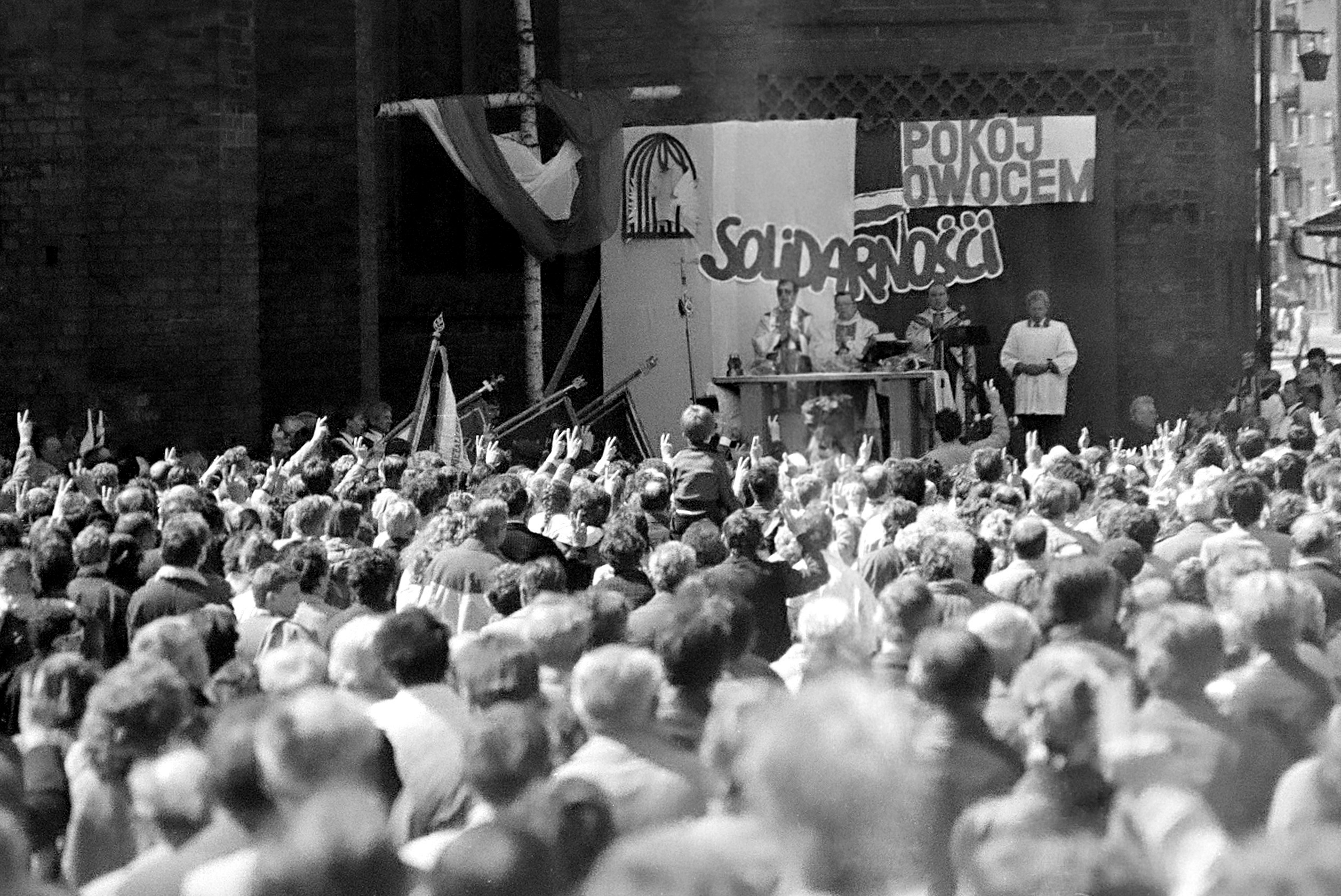 Msza za Ojczyznę u schyłku PRL-u. Podczas śpiewania pieśni "Boże, coś Polskę", unoszono ręce w znienawidzonym przez komunistów geście zwycięstwa ( Gorzów Wlkp. Mszę celebrują ks. W. Andrzejewski, ks. J. Płóciennik, ks. H. Grządko ).